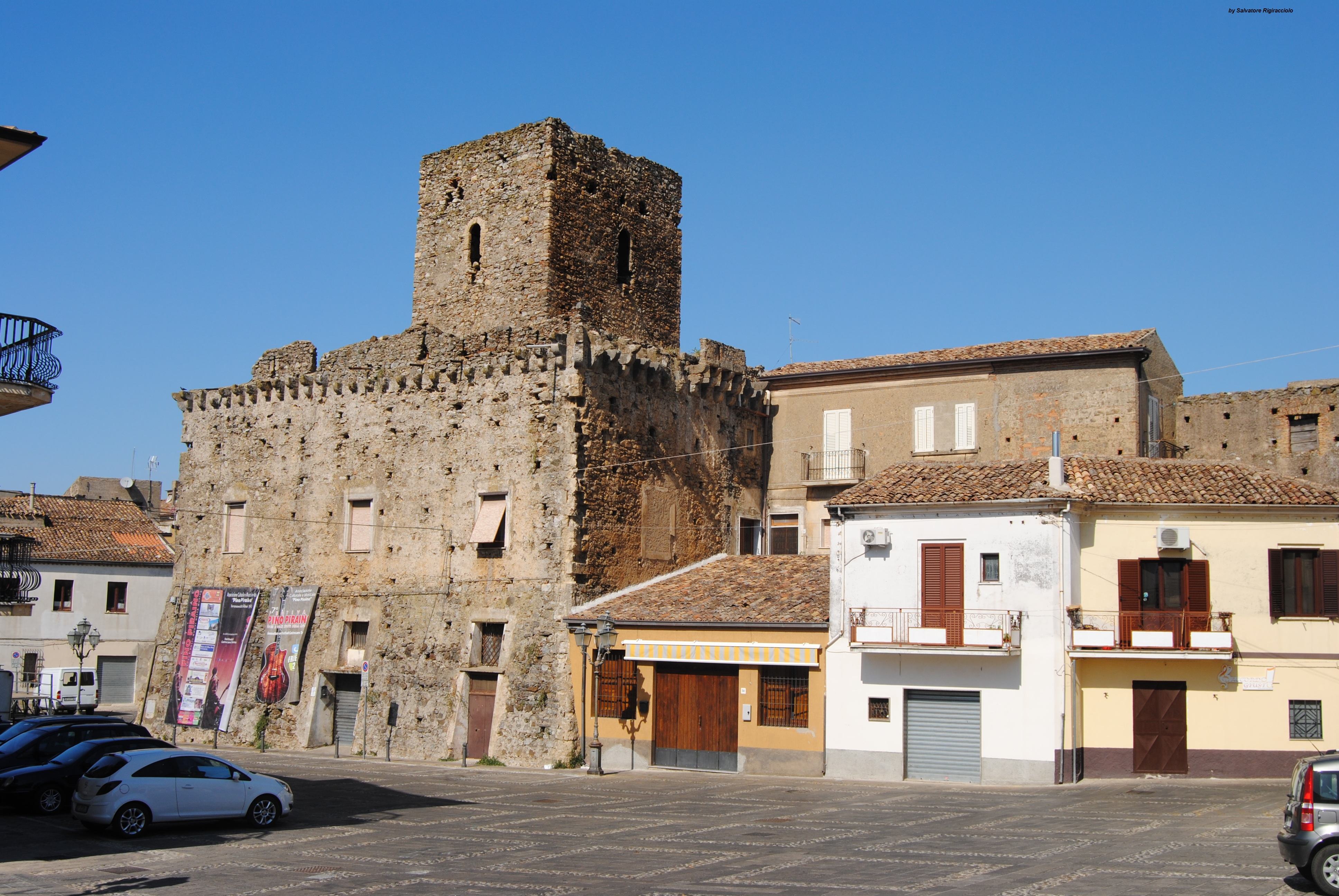 Castello Feudale di Terranova da Sibari - foto Scattata da Salvatore Rigiracciolo in data Agosto 2012